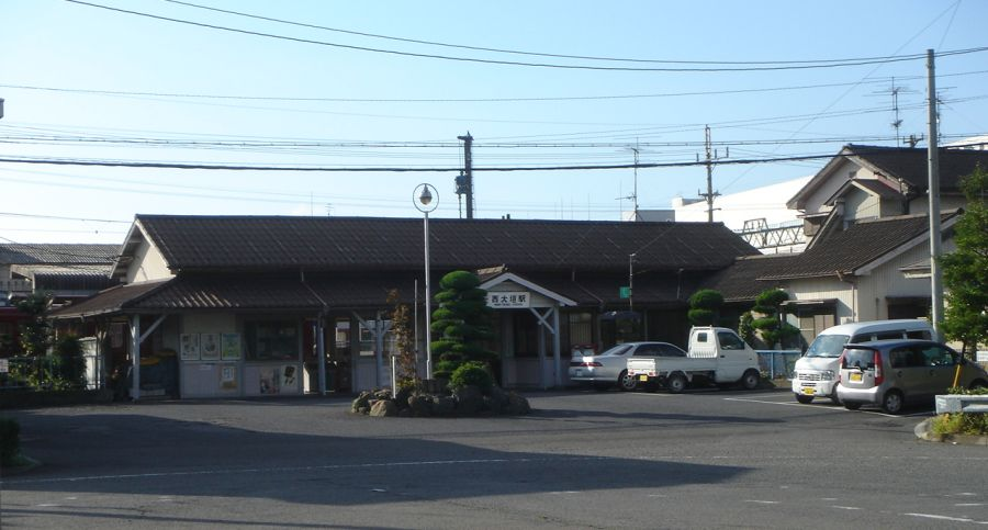 西大垣駅（岐阜県大垣市・養老鉄道養老線（撮影当時は近鉄）） 撮影：投稿者(Monami)、撮影日：2005年11月